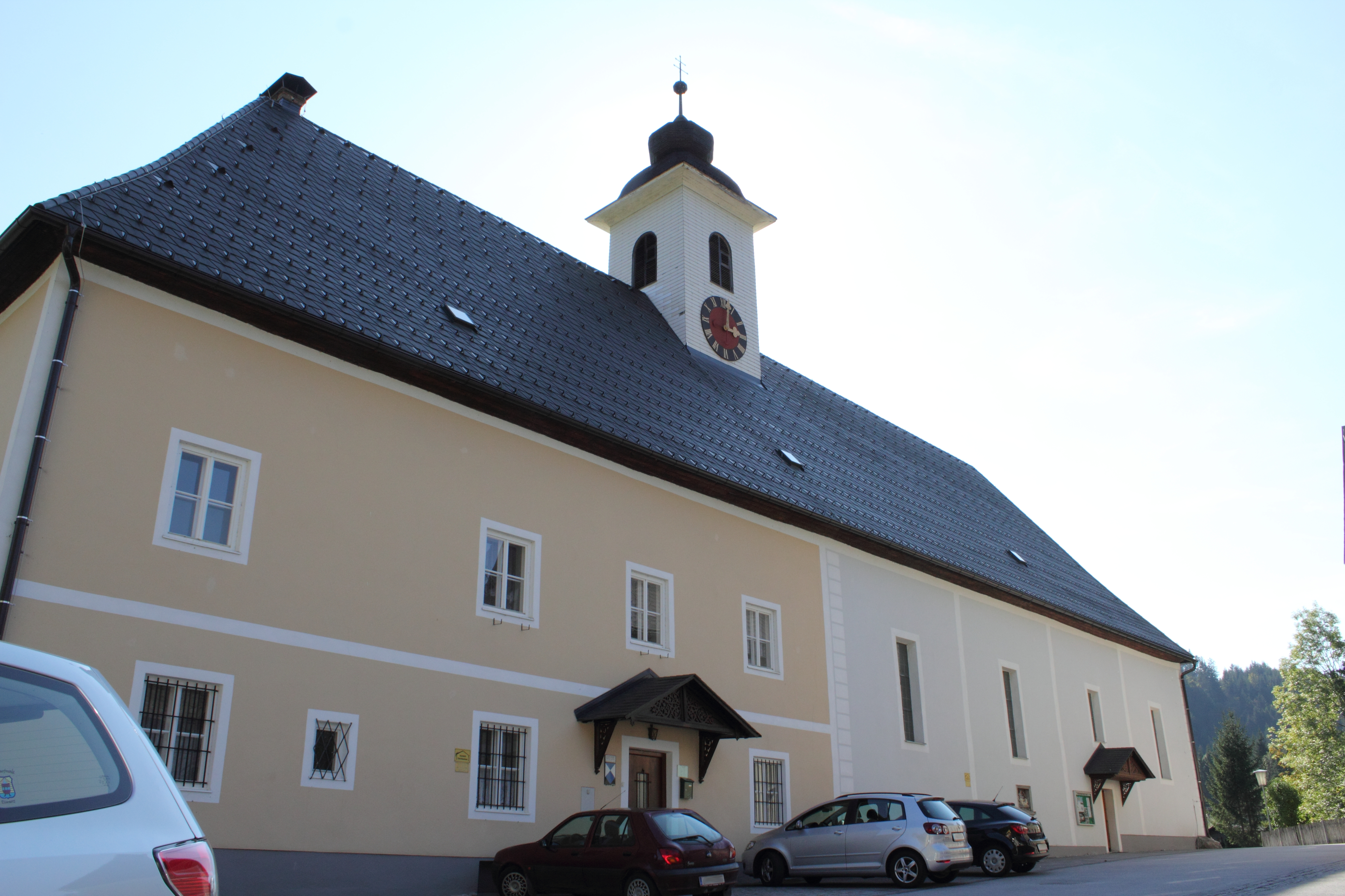 Kath. Pfarrkirche hl. Joseph rechts, Pfarrhof links.